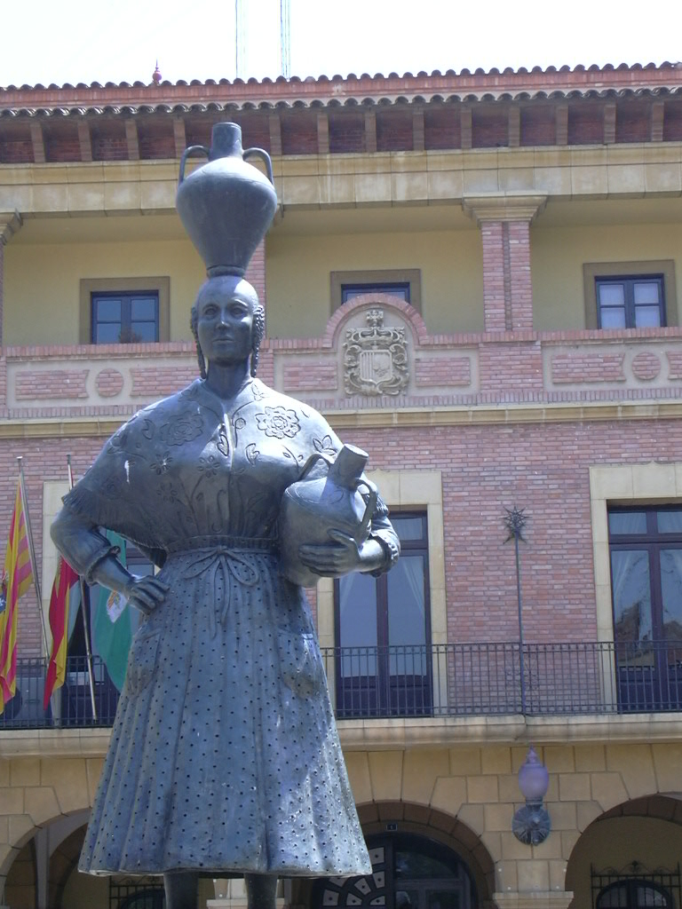 Fraga. Monumento a la dona de faldetes con ayuntamiento al fondo.